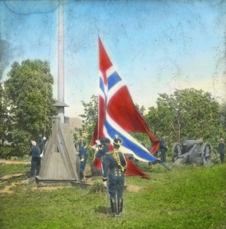 Det rene norske flagget heises på Akershus festning. Håndkolorert dias. To offiserer overvåker heisingen av det norske flagget på Akershus festning 9. juni 1905. To soldater heiser flagget, mens to står oppstilt ved en kanon.